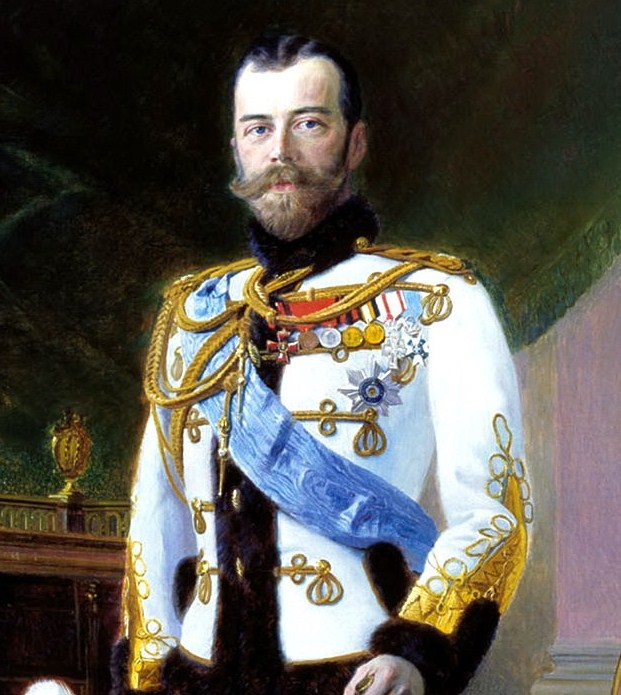 Zar Nicolás II.